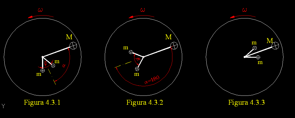 Equilibrado de ejes